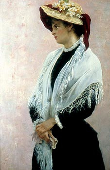 hermosa mujer con chal